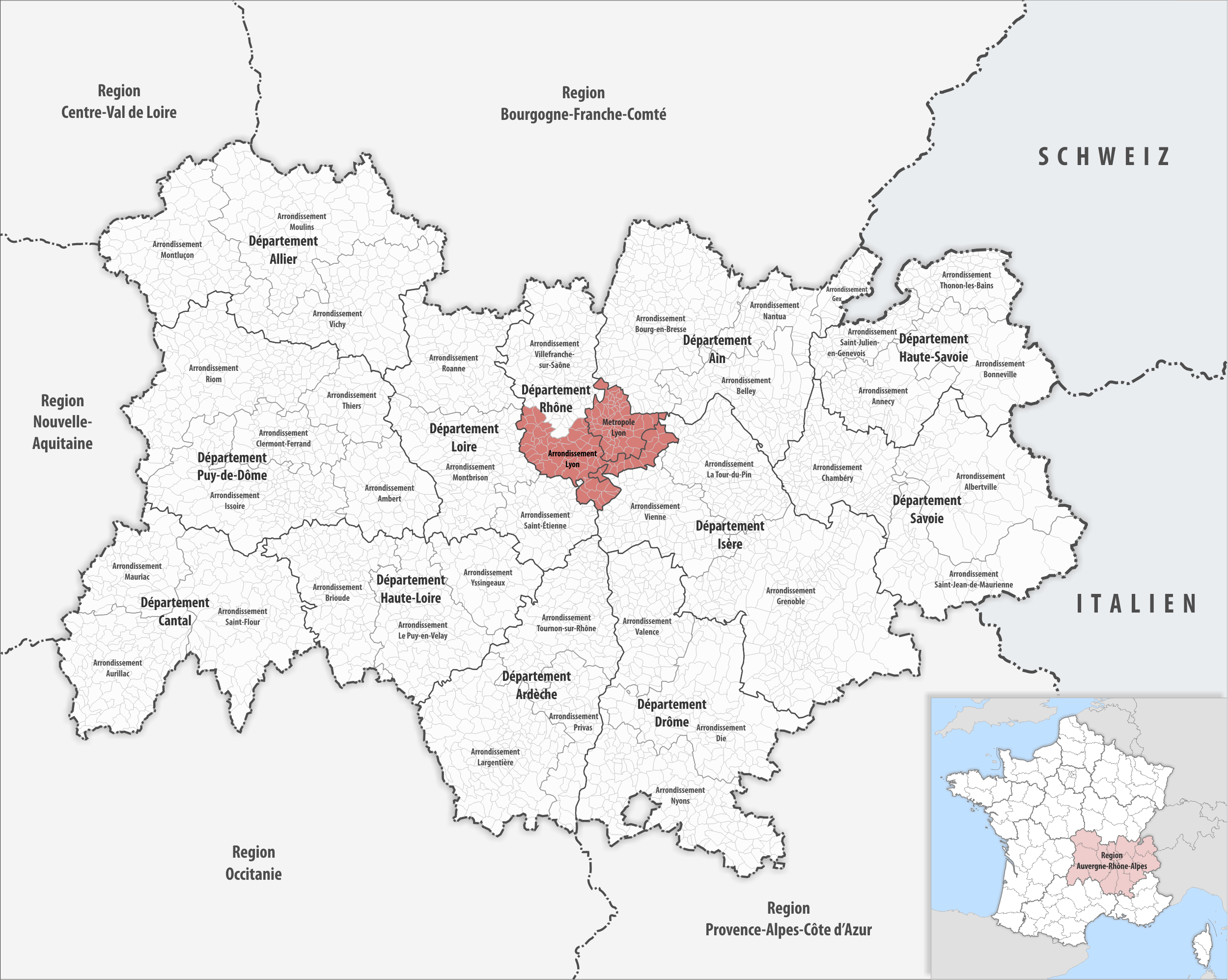 Lage des Arrondissements Lyon